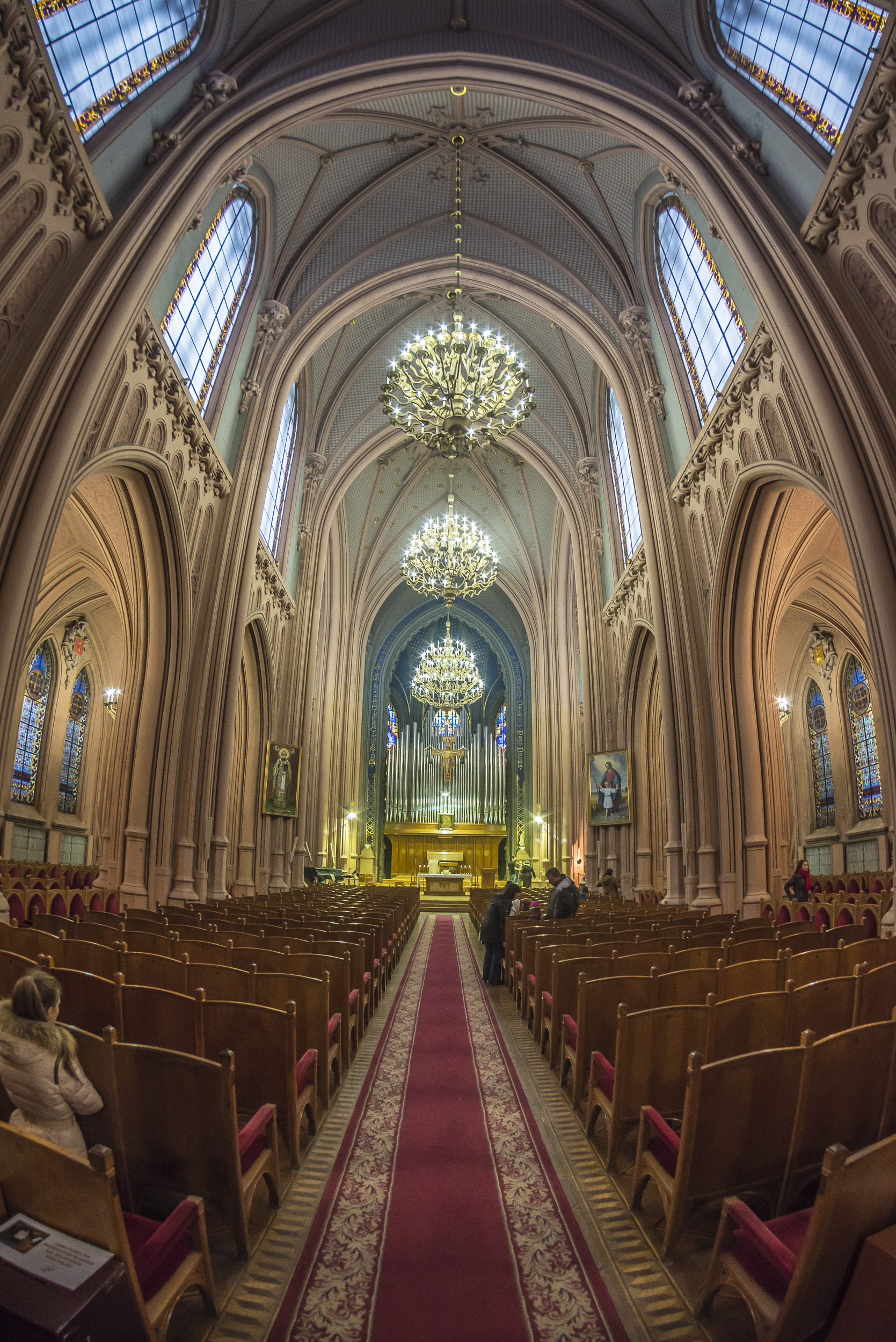 Костьол св. Миколая, Київ, Велика Васильківська вул., 77